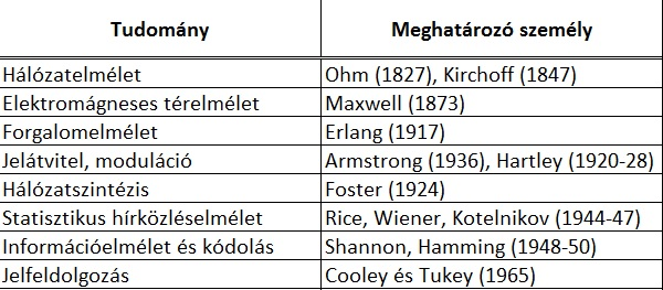 Elméleti alapok